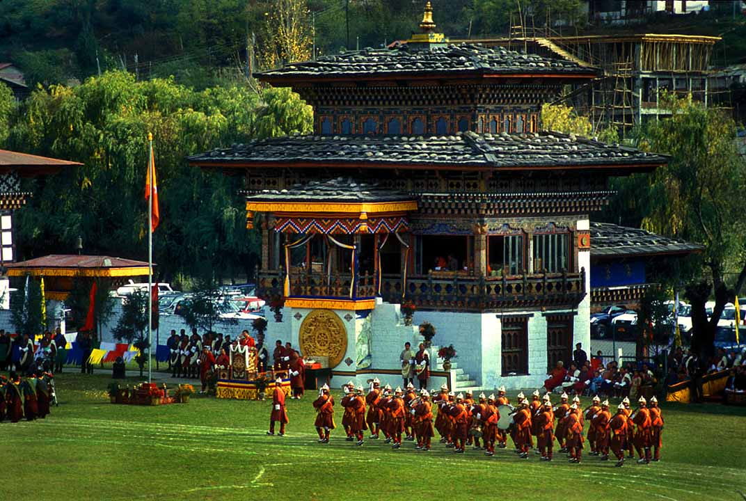 King's Birthday, Changlimethang Stadium, Thimphu, BhutanBhutan